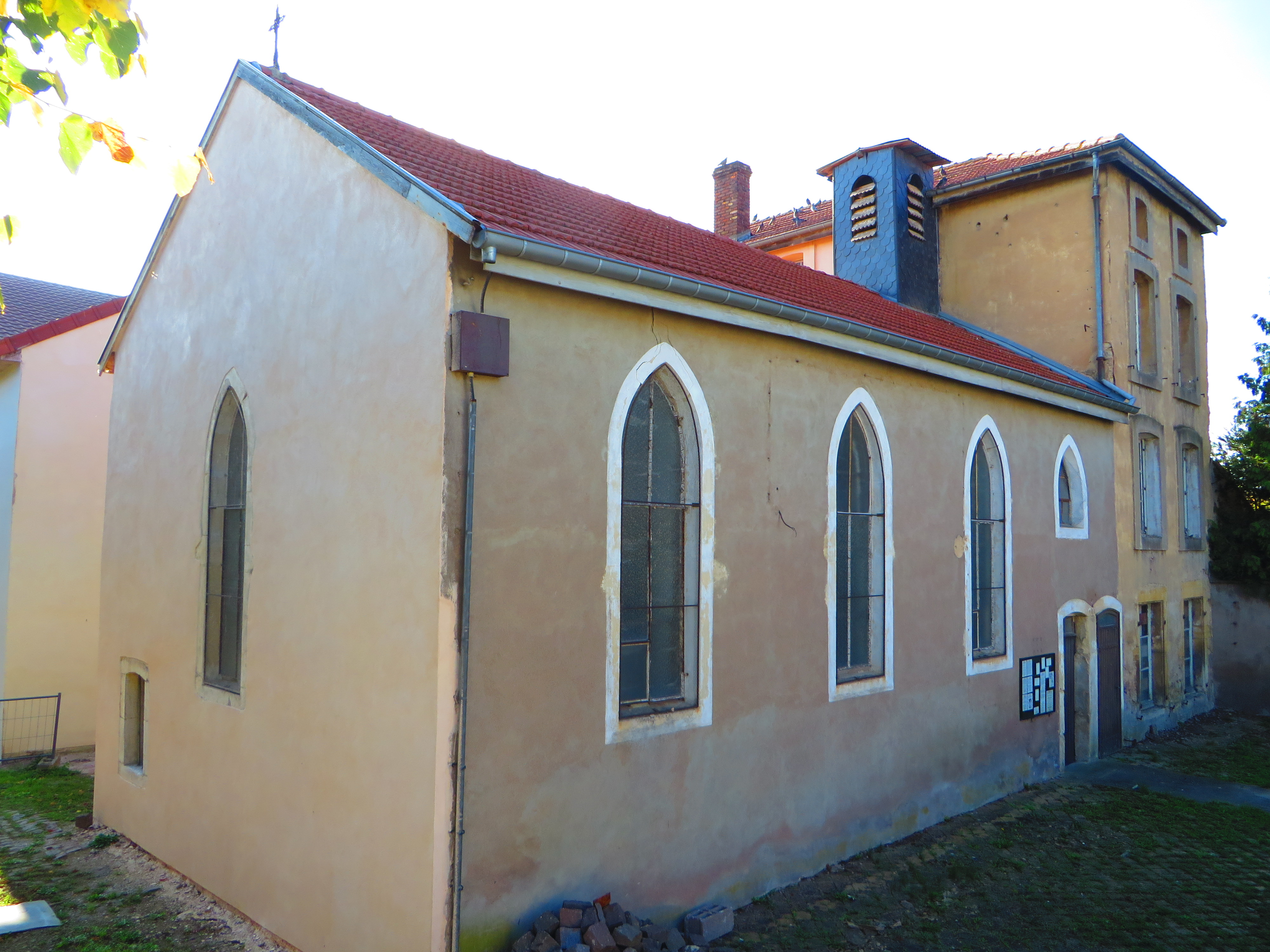 Château-Salins la chapelle Saint-Vincent